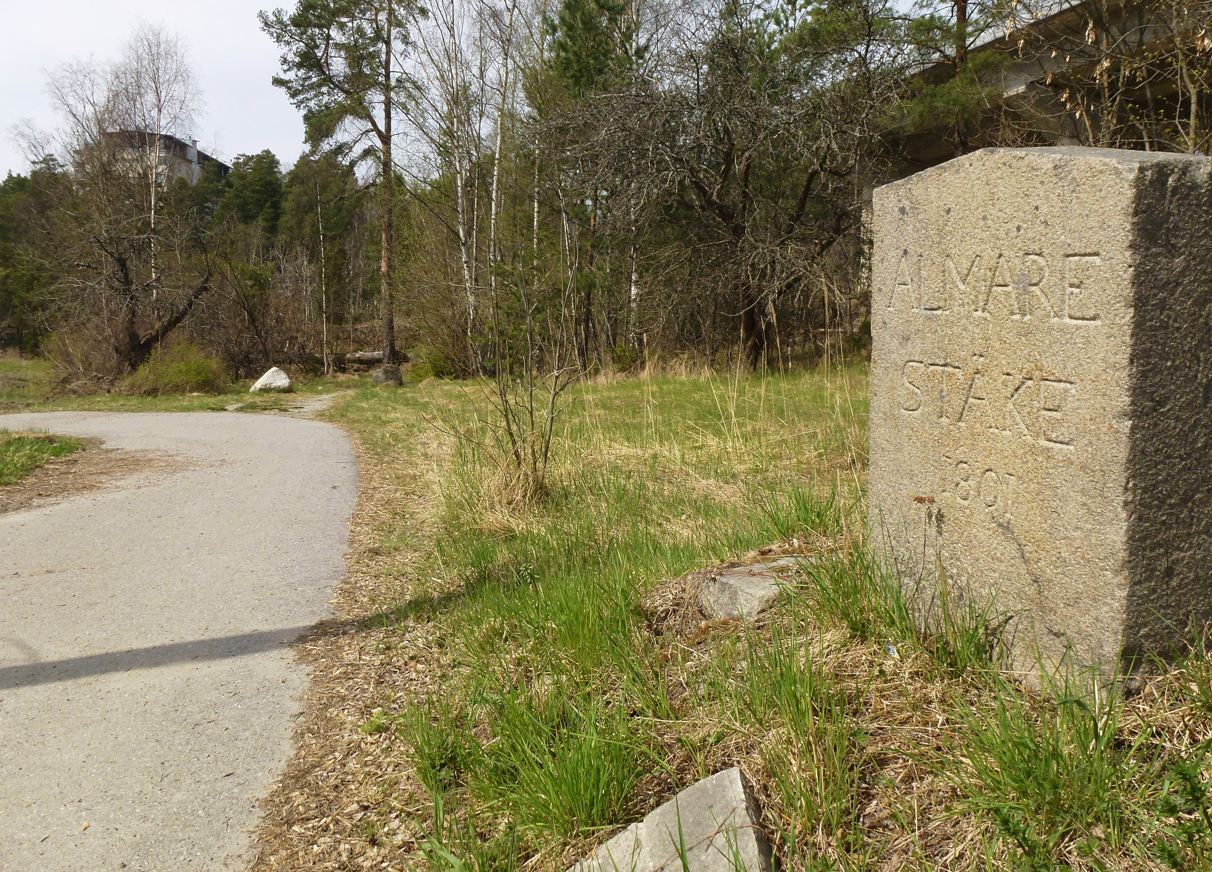 Gränssten "Almare Stäke 1801" RAÄ-nummer Kungsängen 106:1